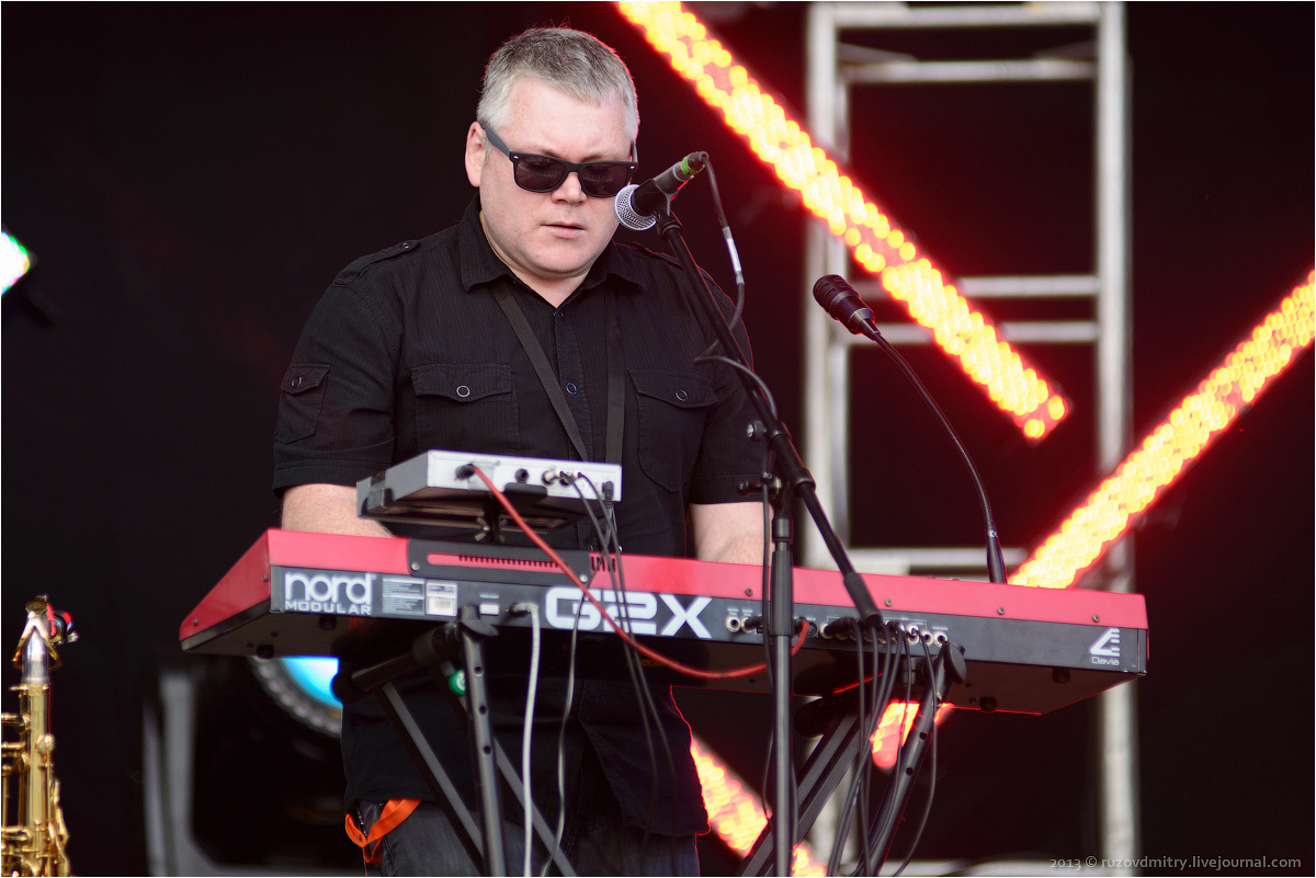 Константин Лекомцев, группа "Смысловые Галлюцинации", фестиваль "Рок над Волгой" 2013